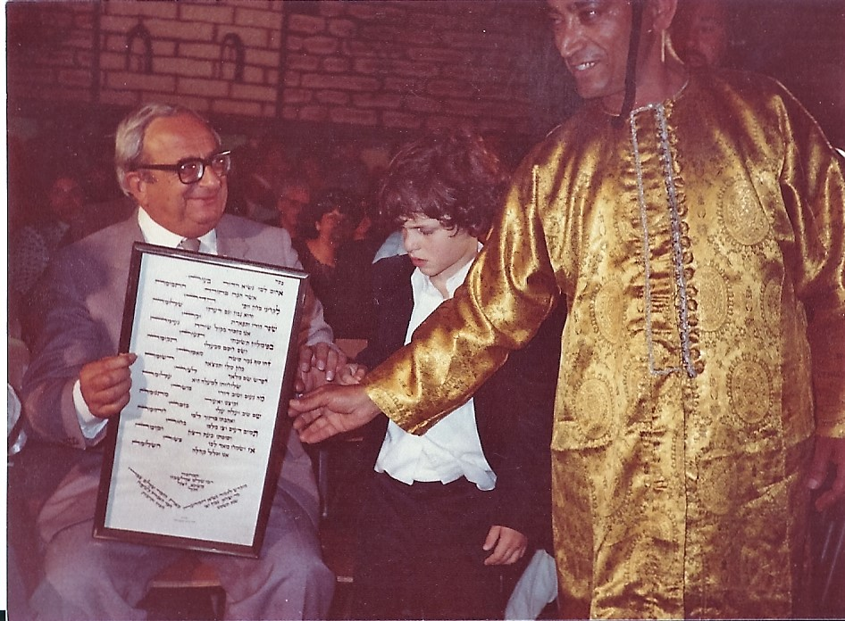 שלום צברי מעניק שיר לנשיא יצחק נבון.